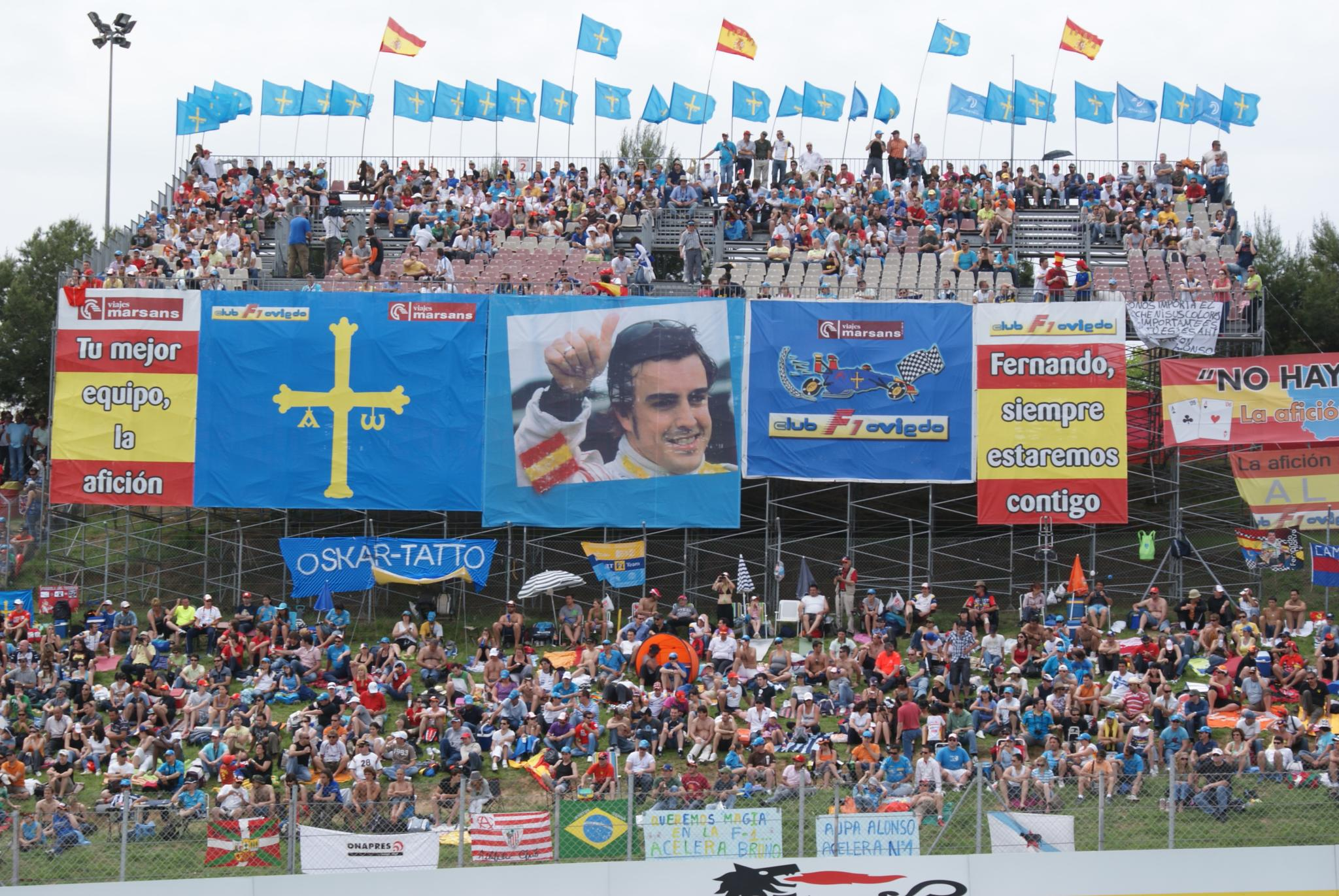 Vista de las gradas con los carteles de apoyo a Fernando Alonso